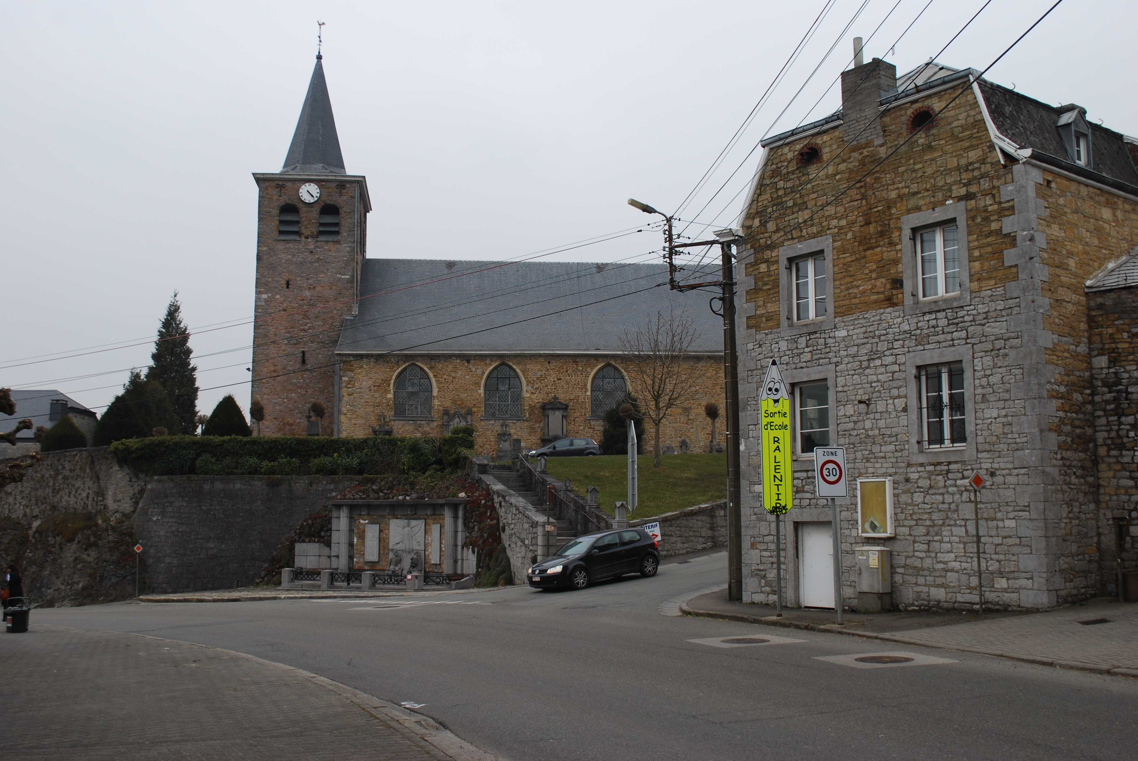 Vue de Sprimont.